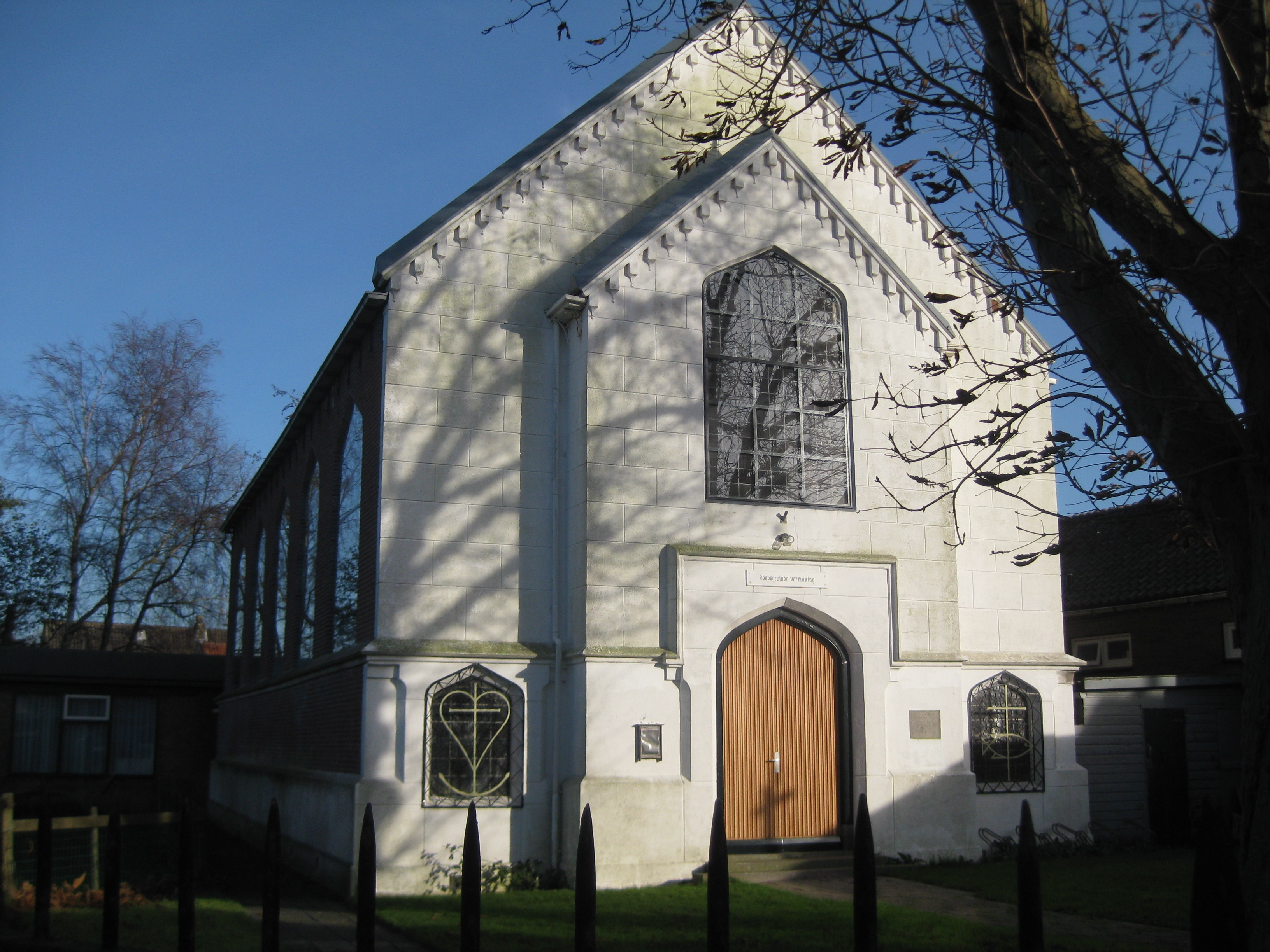 Doopsgezinde Vermaning, Vermaningsteeg 7, Hippolytushoef